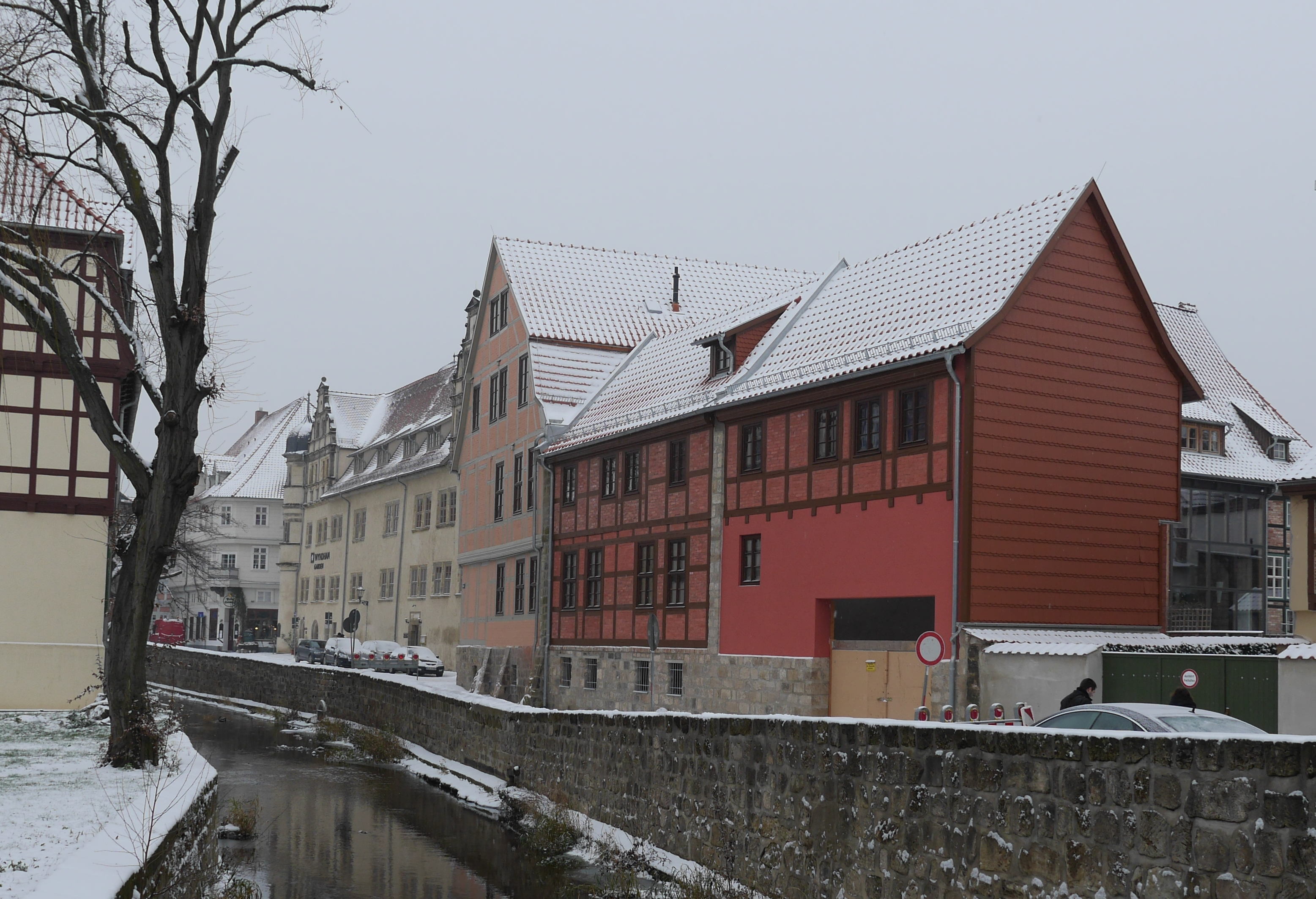 Klink 10 in Quedlinburg im Jahre 2015 während der Sanierung, Ansicht Mühlgraben